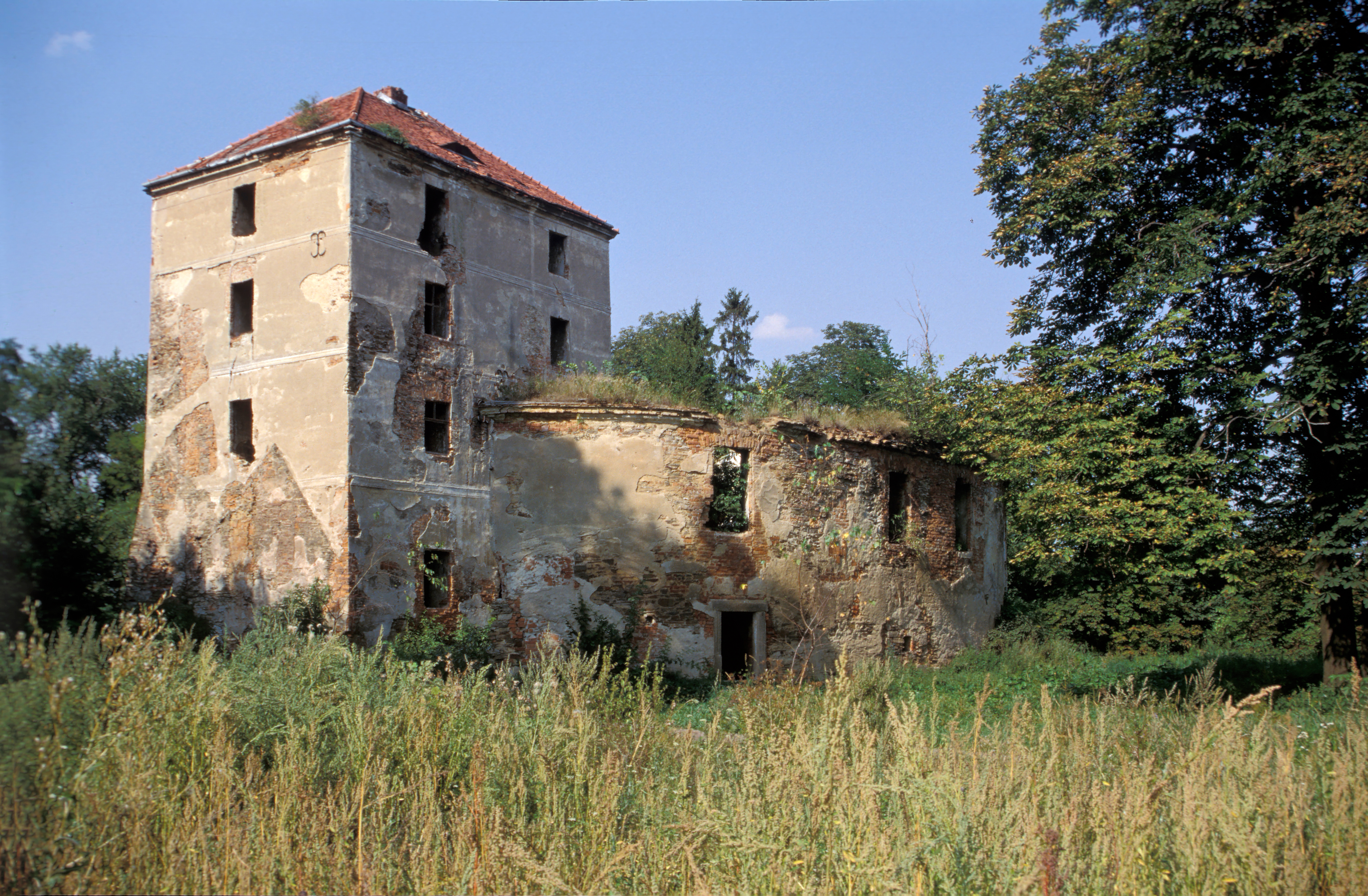 Ciepłowody, ruiny zamku, XIV, XVII